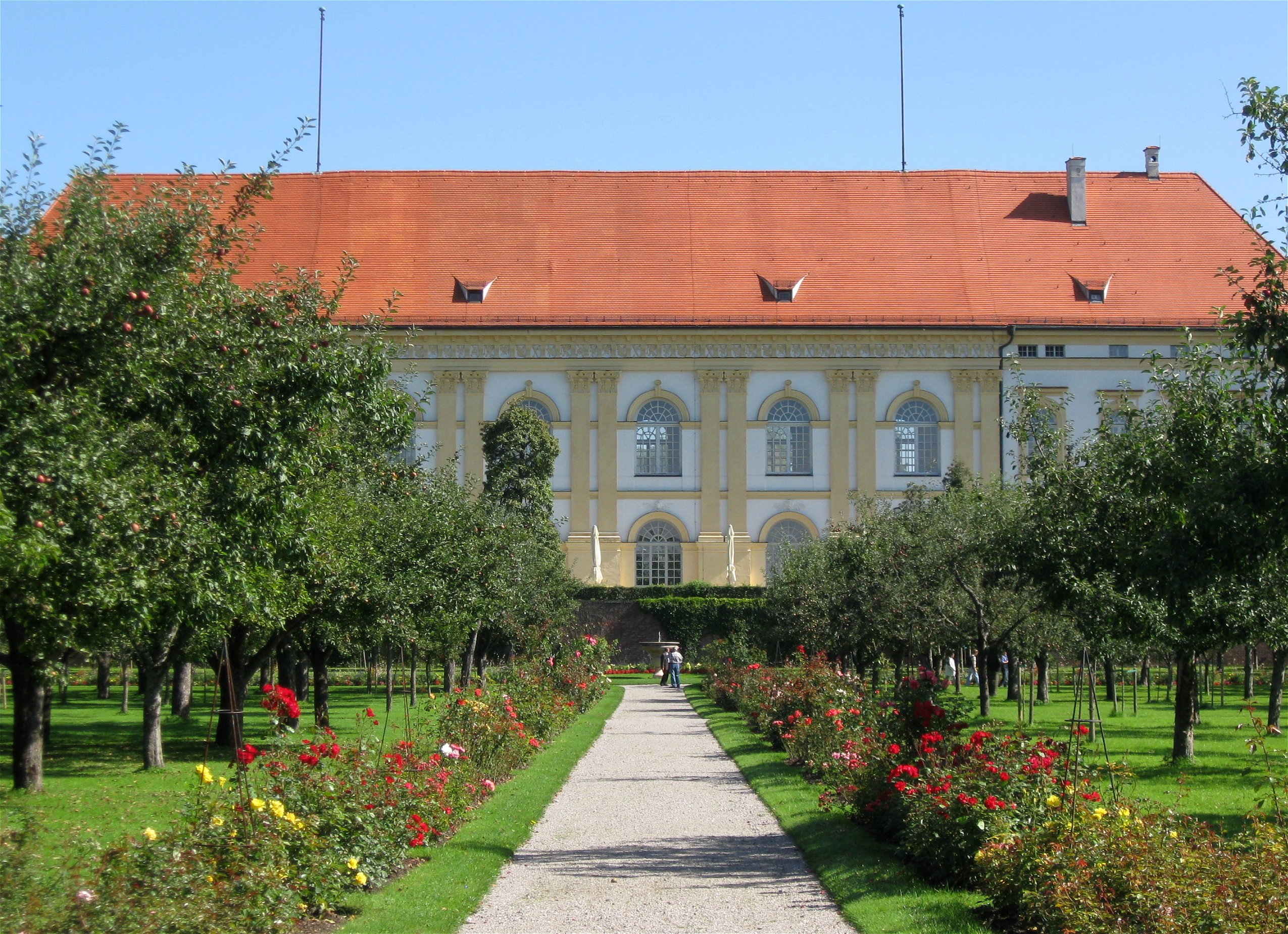 Schloss Dachau, mit Schlossgarten